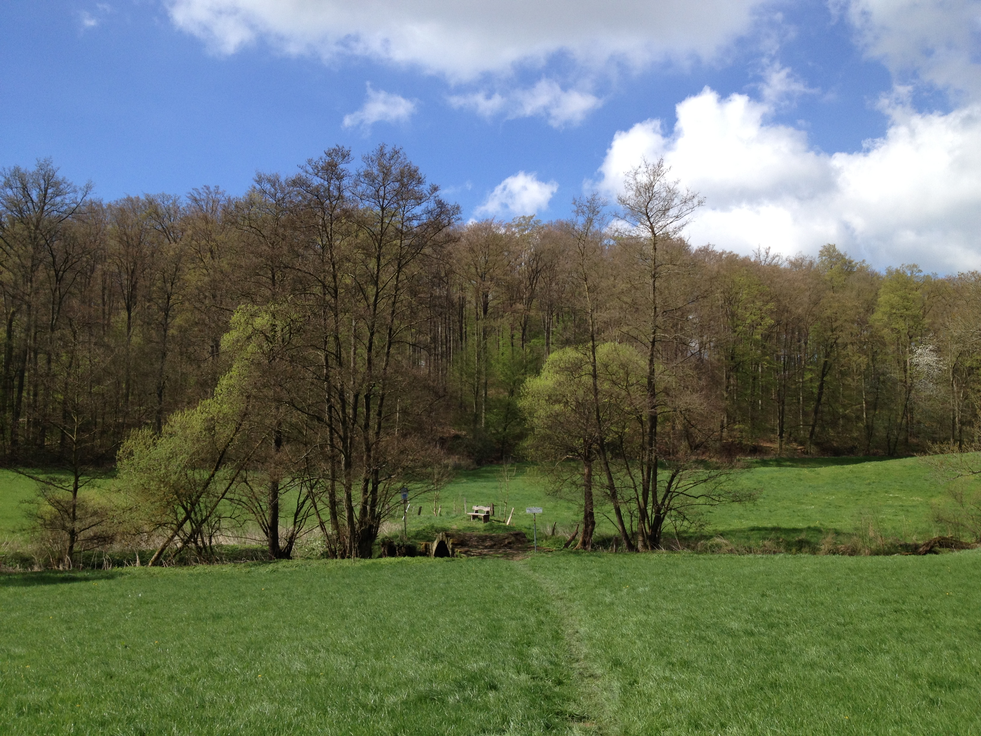 Die Kurfürstenbrücke im Emstal zwischen Merxhausen und der Weißenthalsmühle. Über die Brücke führen der Eco Pfad Friedenspädagogik Bad Emstal, der Rundweg 1 (vom Parkplatz Wiesentahlmühle aus) und der Rundweg E7.